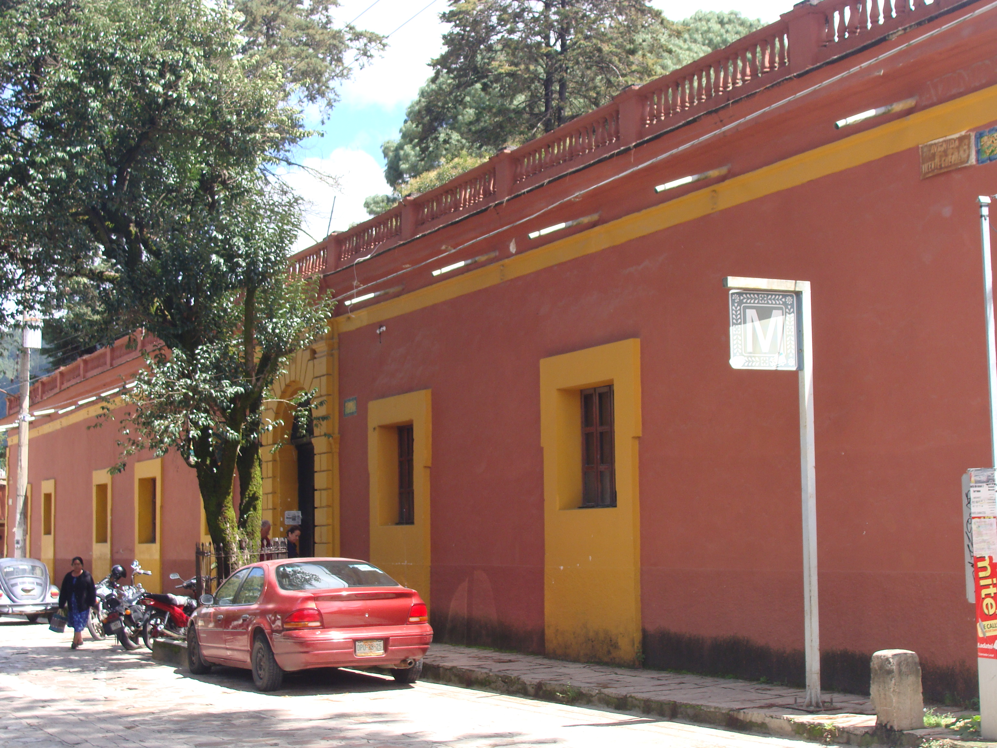 esta es la casas museo donde vivio gertrudy duby y su esposo investigadores de la cultura maya y la selva lacandona en chiapas